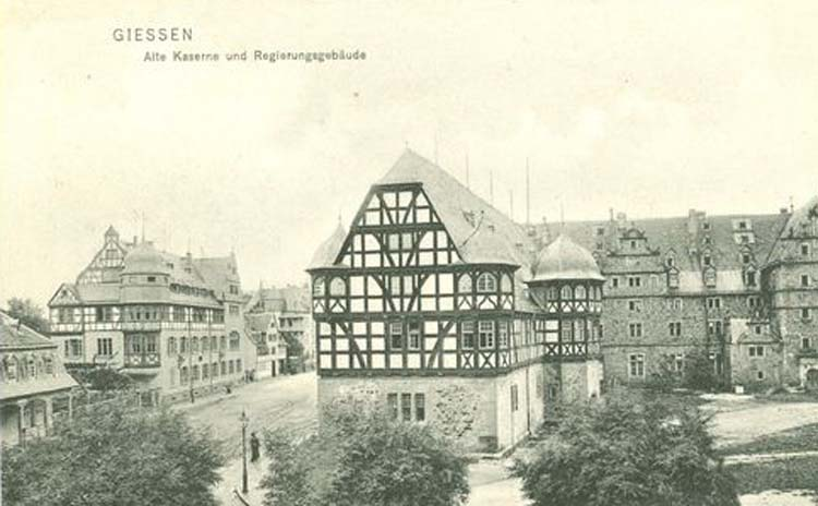 Alte Infanteriekaserne in Giessen